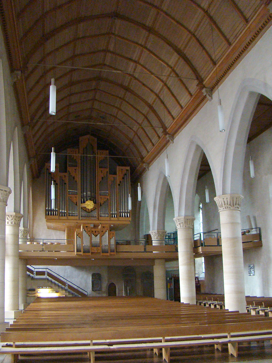 Langhaus der Martinskirche in Kirchheim unter Teck